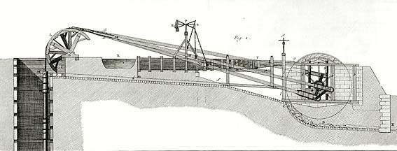 La machine de la nouvelle mine, établie par Pierre-Joseph Laurent à la mine de Pont-Péan, dessinée et présentée dans l'encyclopédie de Diderot par Louis-Jacques Goussier